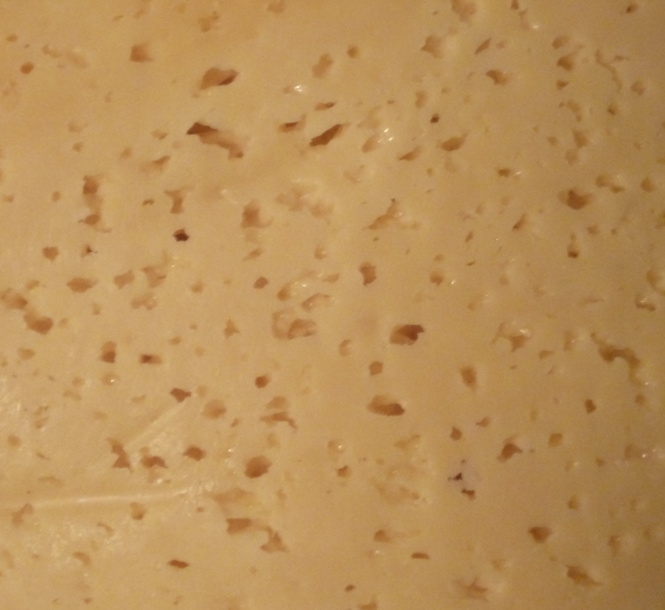 Костромской сыр